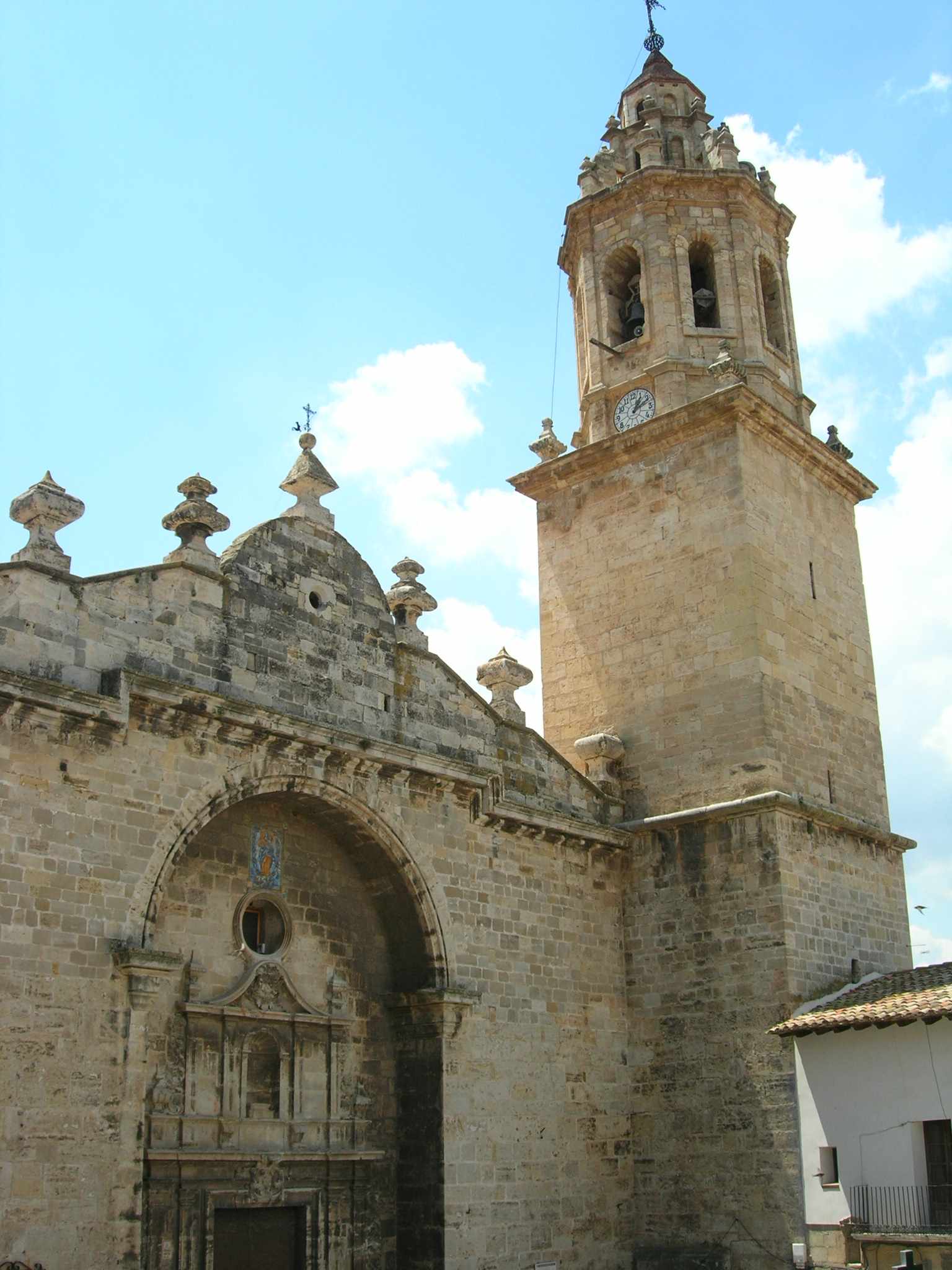 Església i Torre de Santa Maria la Major (Pena-roja)